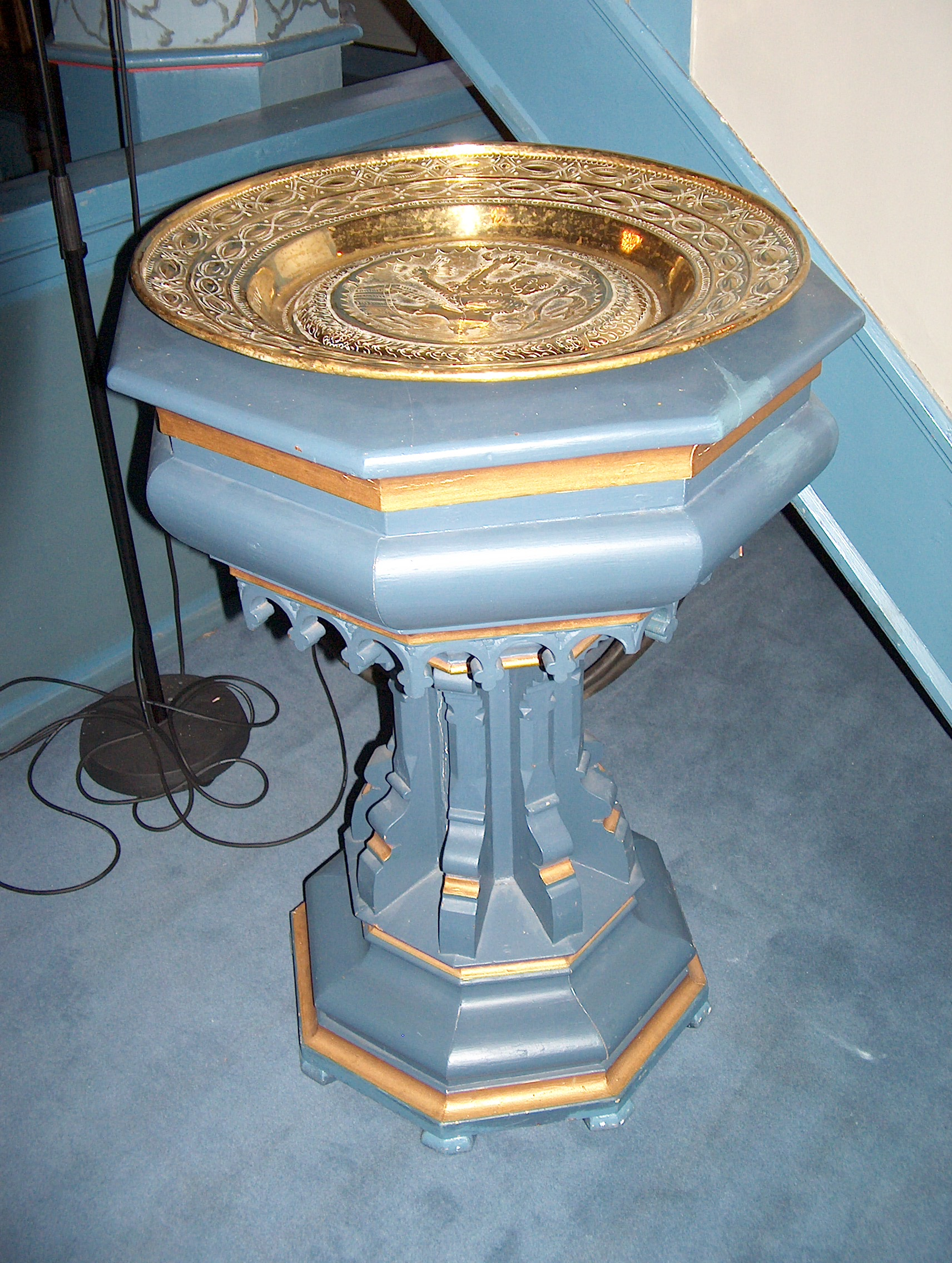 Lunder kirke, Sokna (døpefont, i bruk)